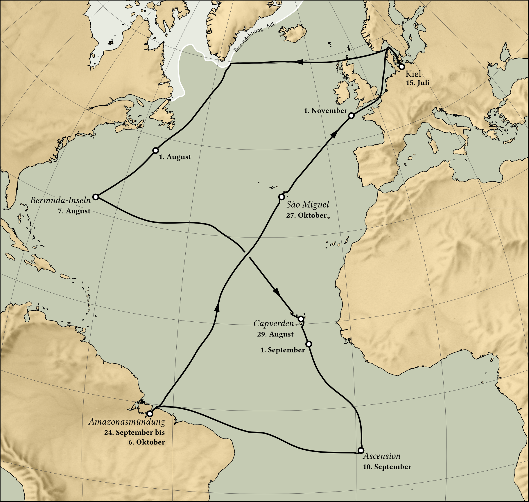 Routenkarte der Plankton-Expedition im Atlantik von 1889 unter der Leitung von Victor Hensen.